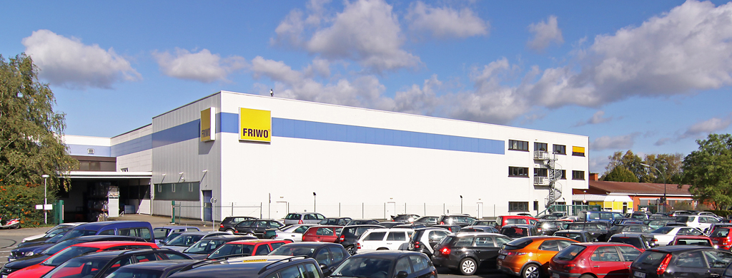 FRIWO Gelände